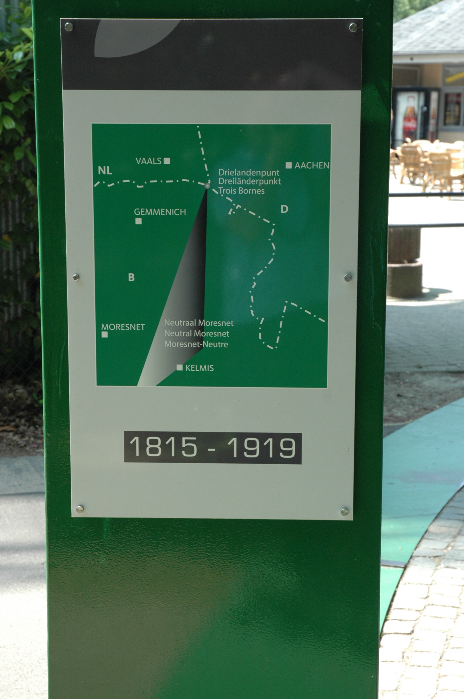 Waarom het DRIElandenpunt aan de VIERgrenzenweg ligt (Neutraal Moresnet)